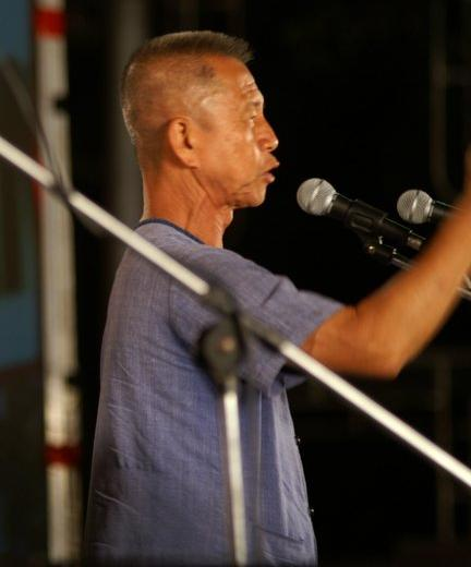 Chamlong Srimuang, 17 March.